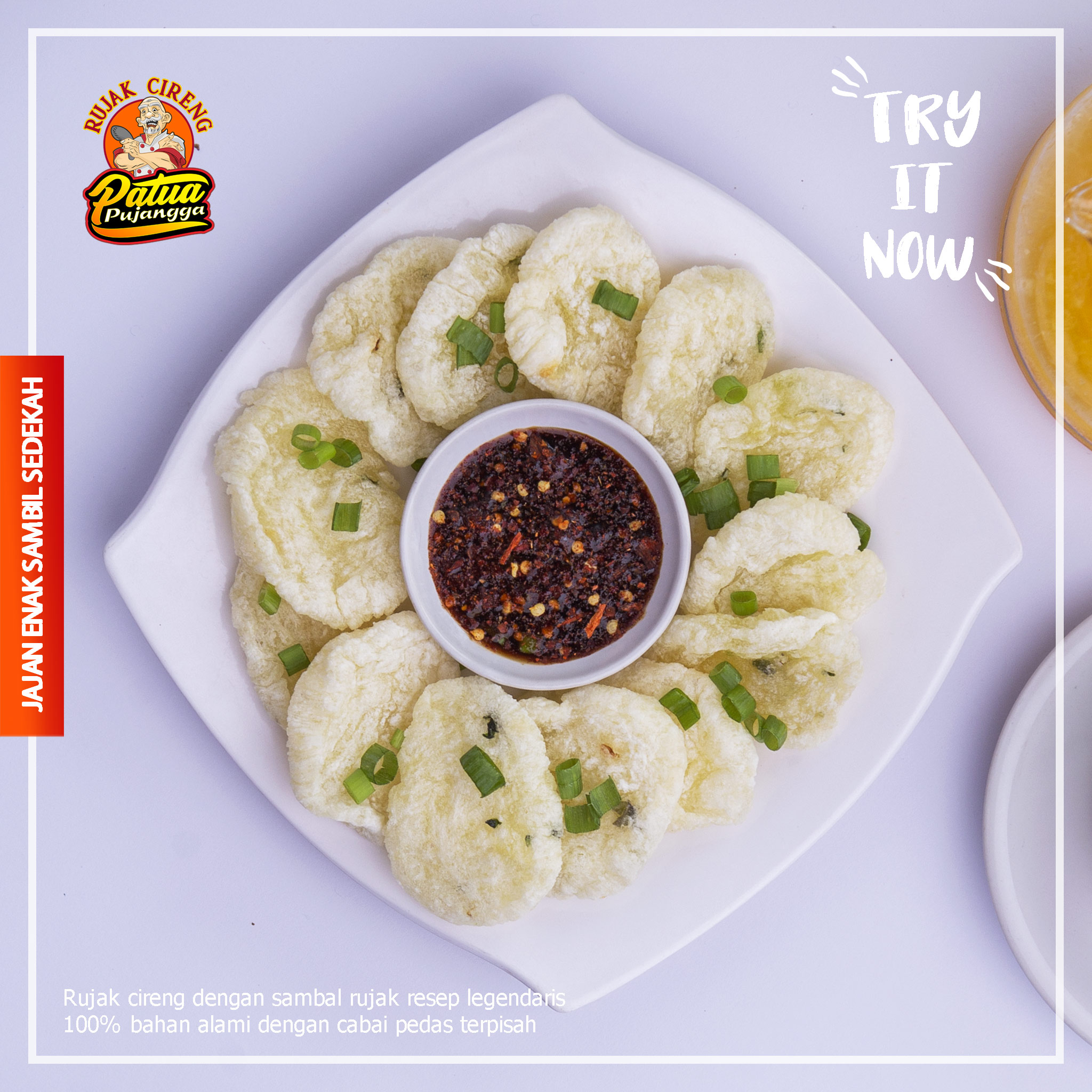 Salah satu cireng varian baru, Rujak cireng patua pujangga yang dijual online saat ini.